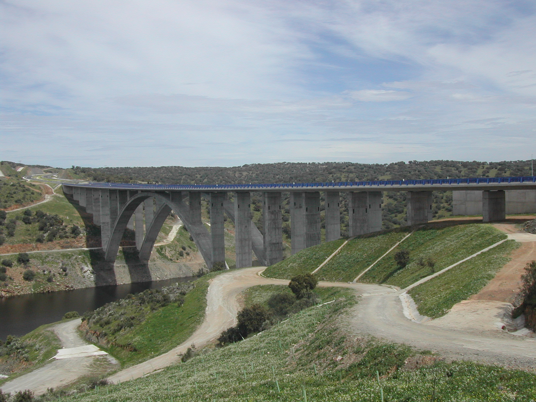 Puente arco de hormigón sobre el río Almonte